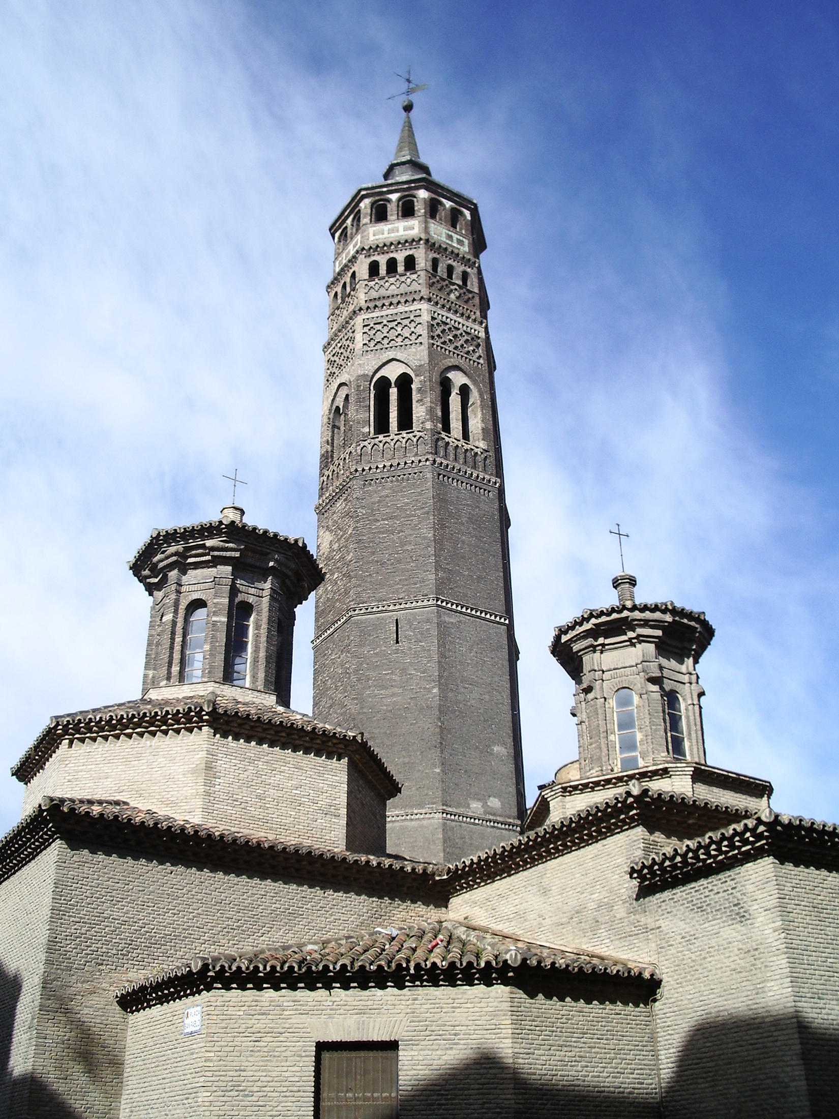 Torre y linternas de San Pablo de Zaragoza